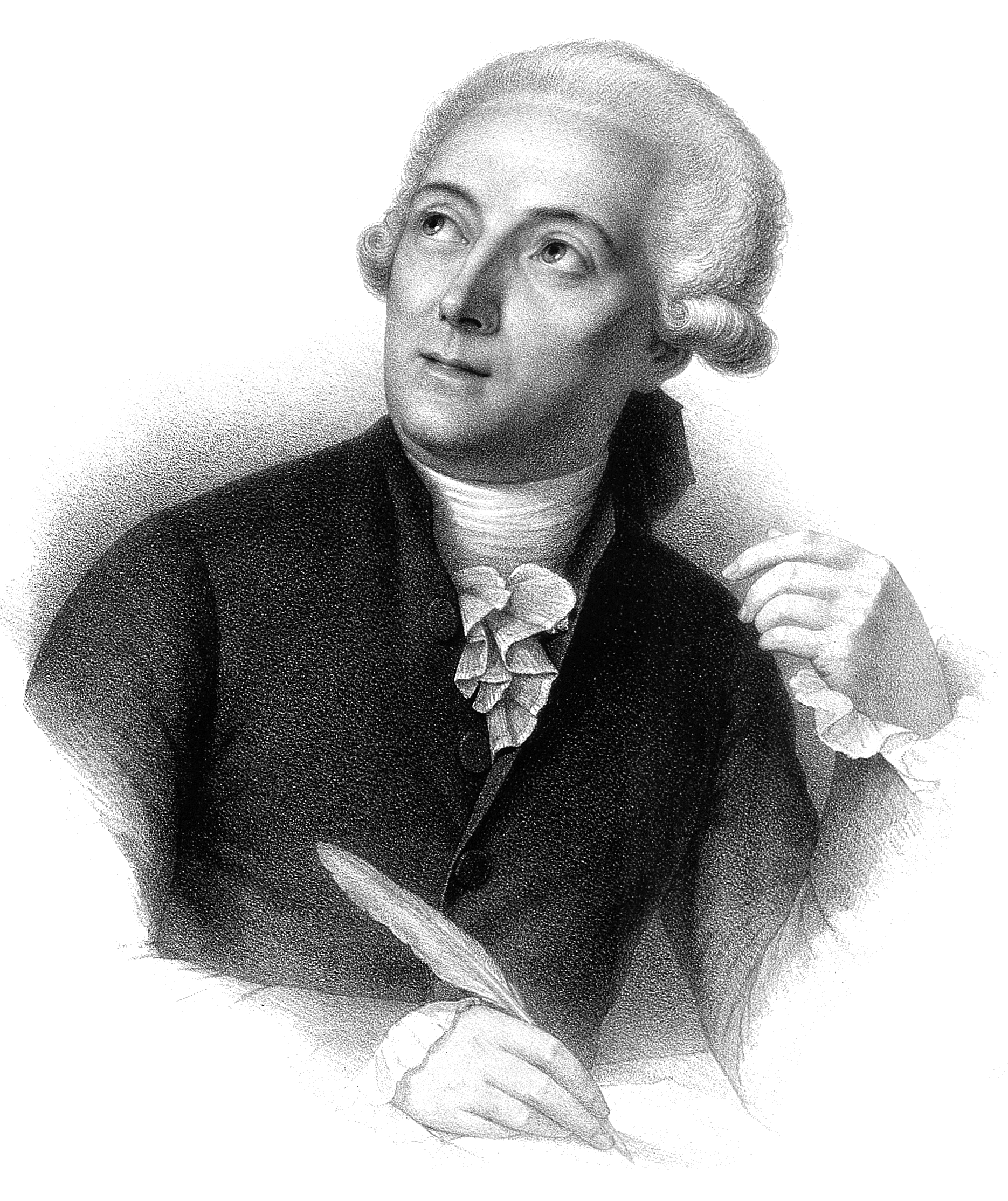 Портрет А. Л. Лавуазье работы литографа Delpech, François Séraphin (1778-1825)